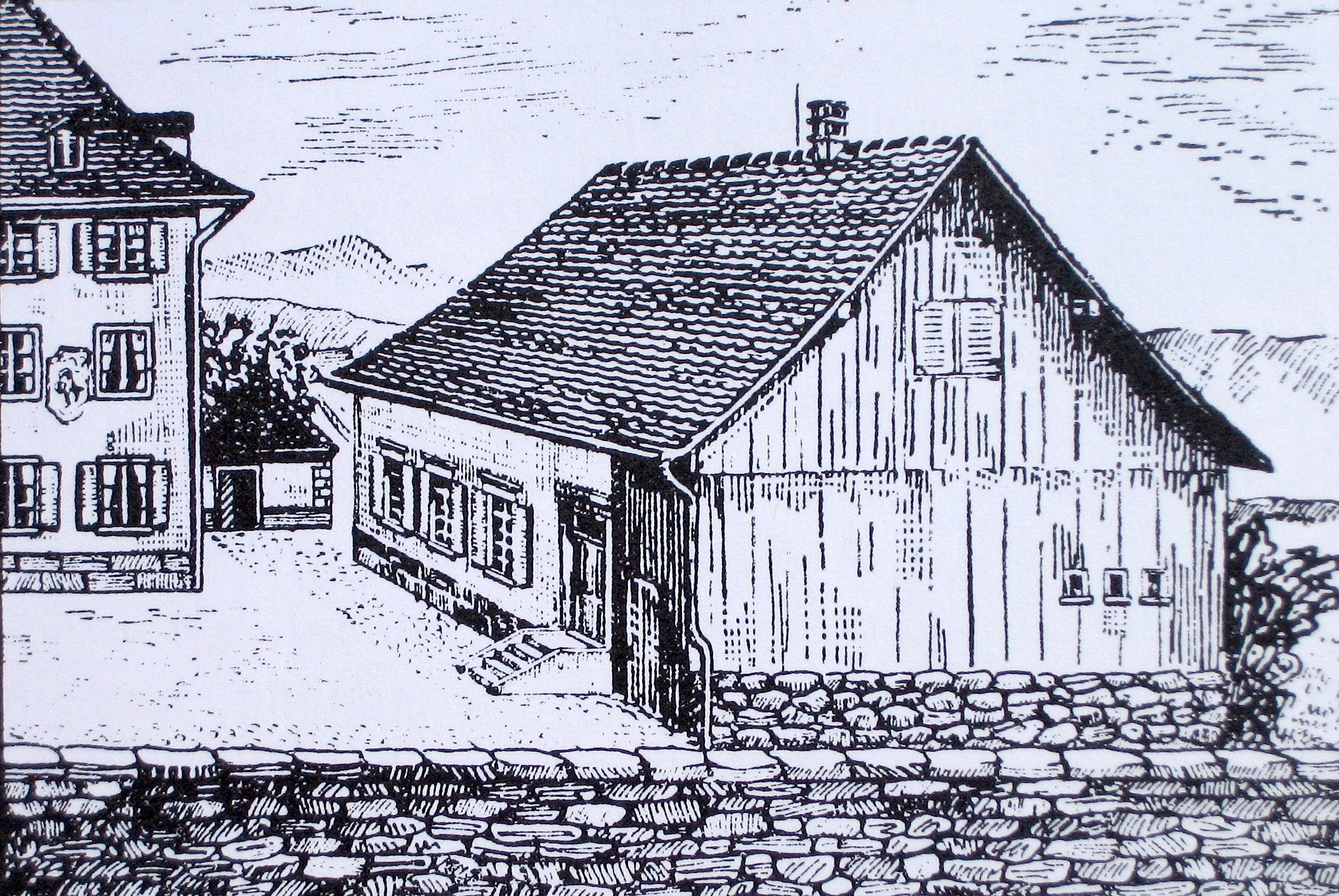 das alte Biohaus der Kantonsschule Küsnacht als Übungsschulhaus